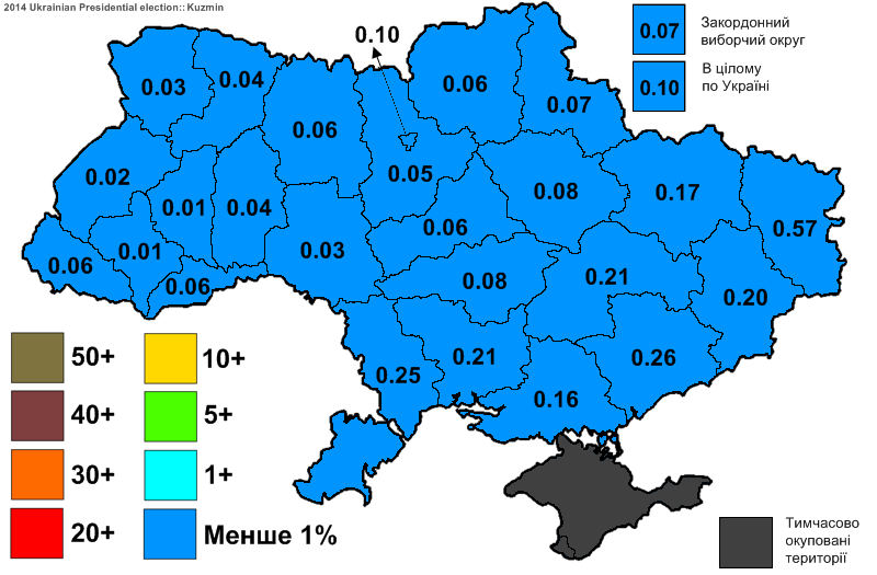 Електоральна підтримка Кузьміна Рената Равелійовича на виборах Президента України 2014.